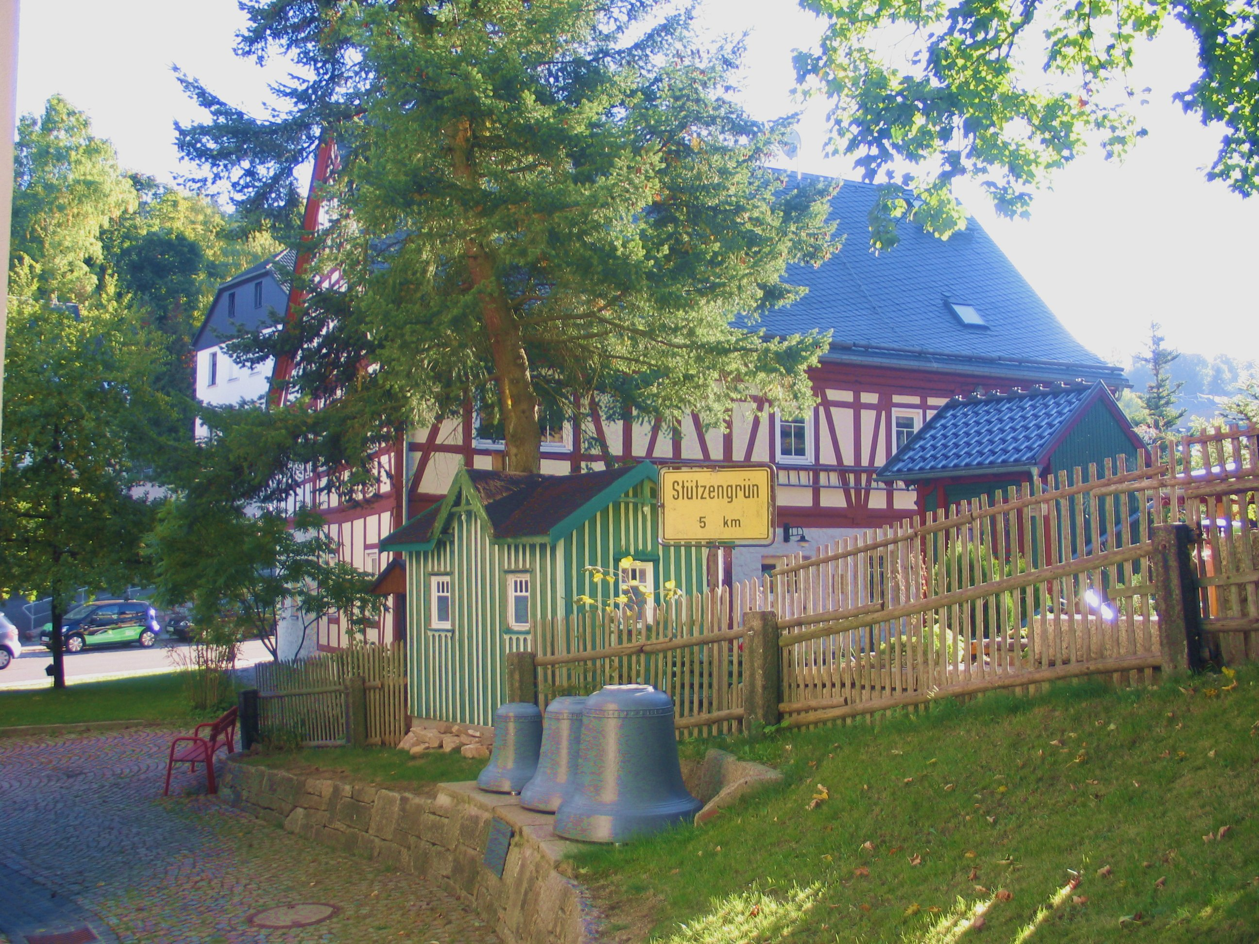 Die Laube wurde dorfabwärts transportiert und dann hinter dem Bürsten- und Heimatmuseum neu aufgestellt.